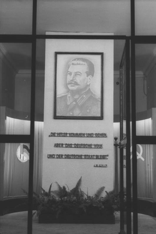 ADN-ZB/Illus-Rudolph Zum 70. Geburtstag J.W. Stalins am 21.12.49 UBz: Mit diesem Stalinbild und seinem darunter stehenden Ausspruch ist der Eingang des Berliner Verlages geschmückt.